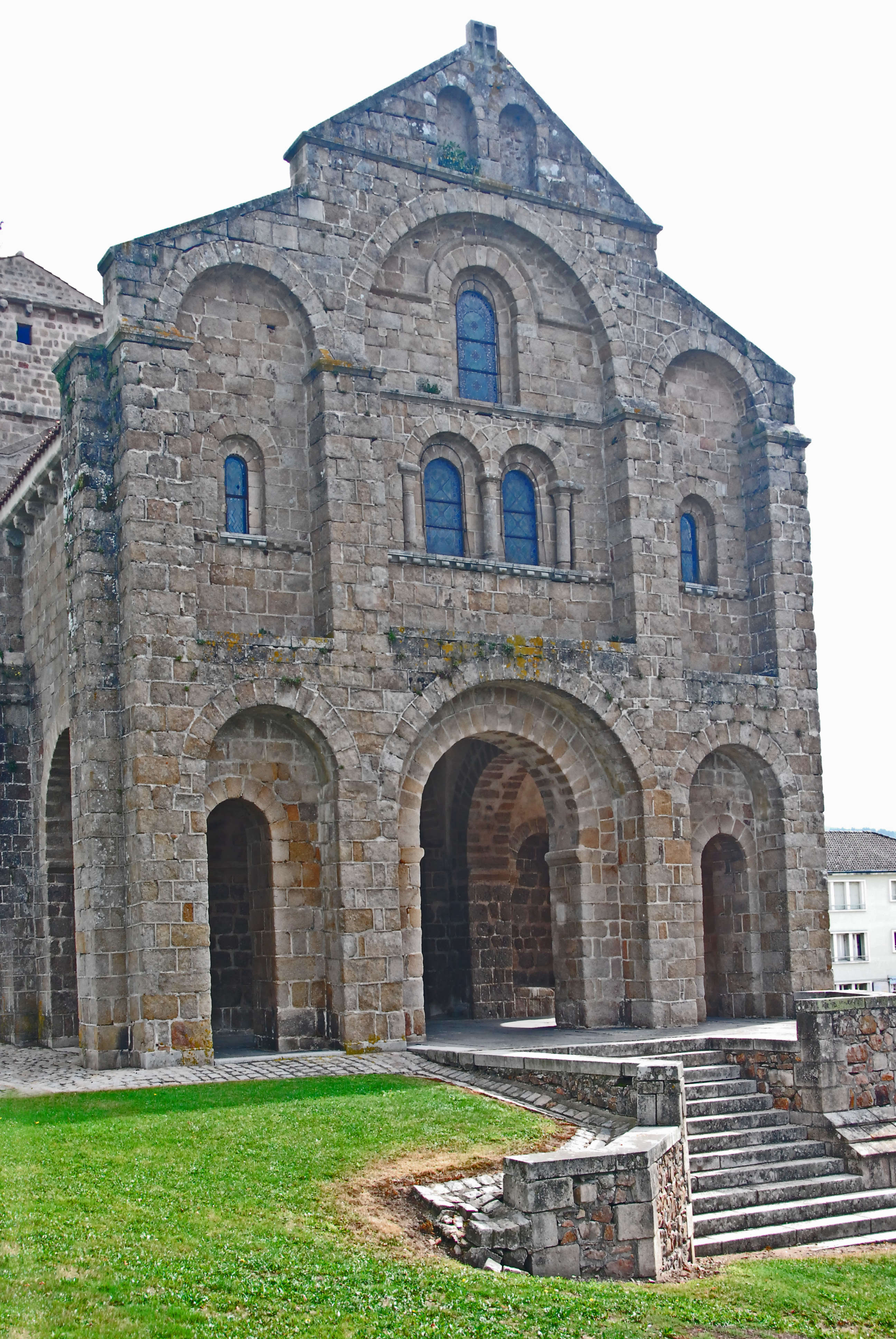 N.-D. de Châtel-Montagne, Portalvorbau, Fassade von W